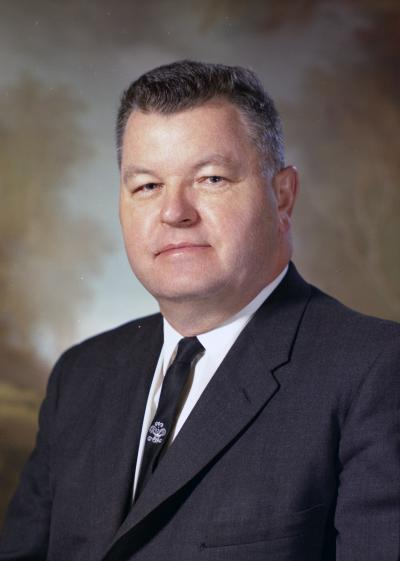 Senator A. L. Rasmussen, 1967